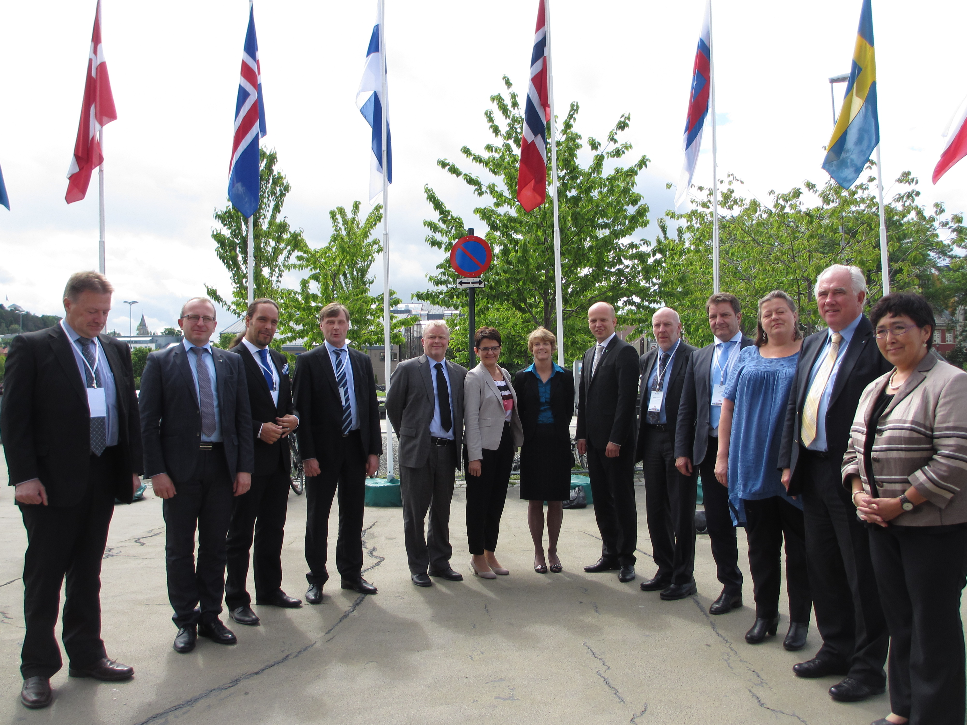 Nordisk ministerråd for fiskeri, jordbruk, næringsmidler og skogbruk (MR-FJLS) i Trondheim 28. juni 2012. Fra venstre til høyre: Færøyenes fiskeriminister Jacob Vestergaard, statssekretær i Sveriges Landsbygdepartementet Magnus Kindbom, Ålands næringsminister Frederik Karlstsrøm, Finlands landbruks- og skogbruksminister Jari Koskinen, statssekretær i Helse- og omsorgsdepartementet Kjell Erik Øie, fiskeri- og kystminister Lisbeth Berg-Hansen, landbruks- og matminister Trygve Slagsvold Vedum, visegeneraldirektør i FAO Ann Tutwiler, Islands fiskeri- og landbruksminister Steingrímur J. Sigfússon, Færøyenes handels- og industriminister Johan Dahl, Danmarks minister for mat, landbruk og fiskeri Mette Gjerskov, generalsekretær i Nordisk Ministerråd Halldór Ásgrímsson og Grønlands fiskeriminister Ane Hansen.